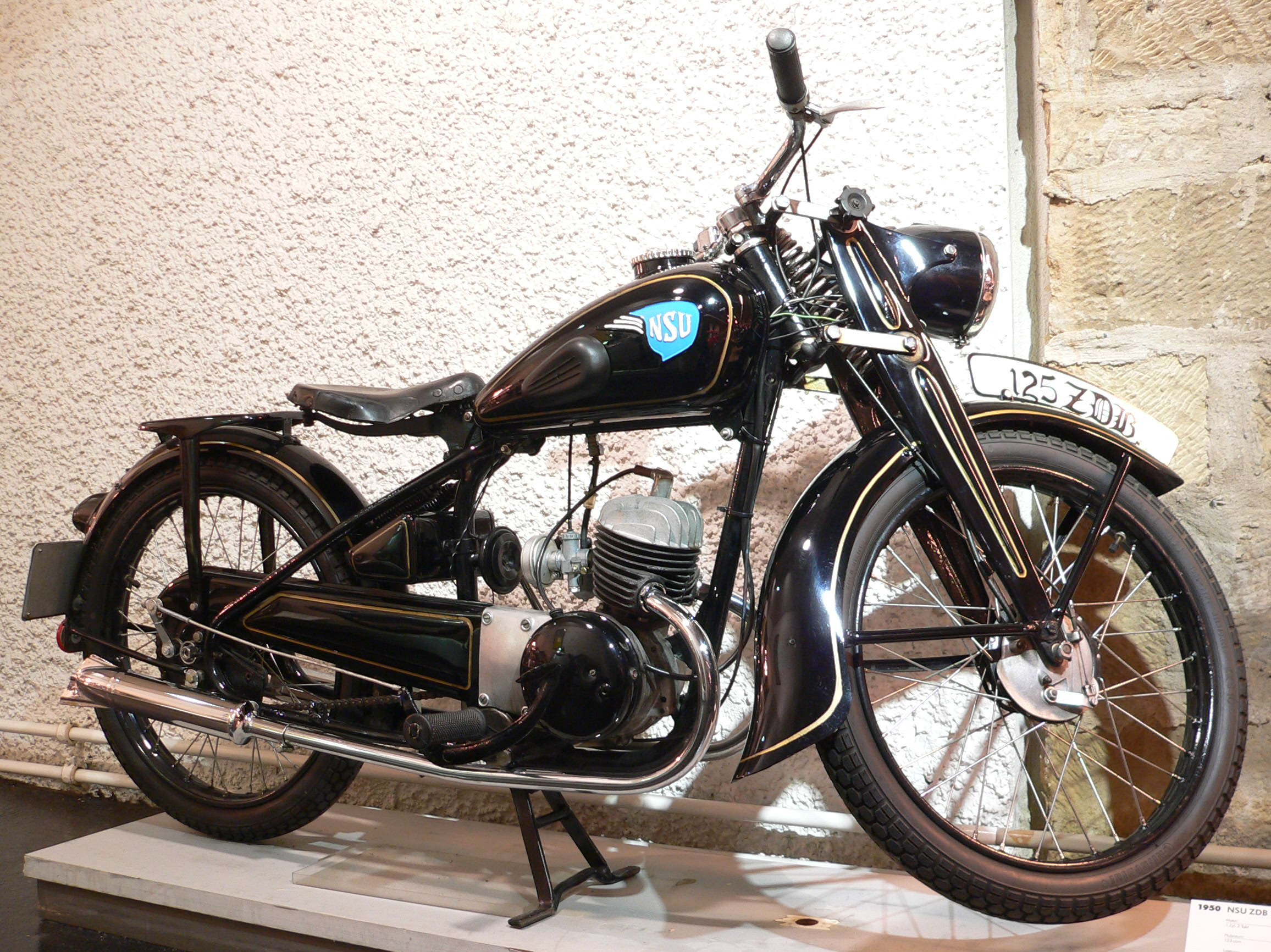 Motorbike "NSU 125 ZDB" (1950) at the Deutsches Zweirad- und NSU-Museum